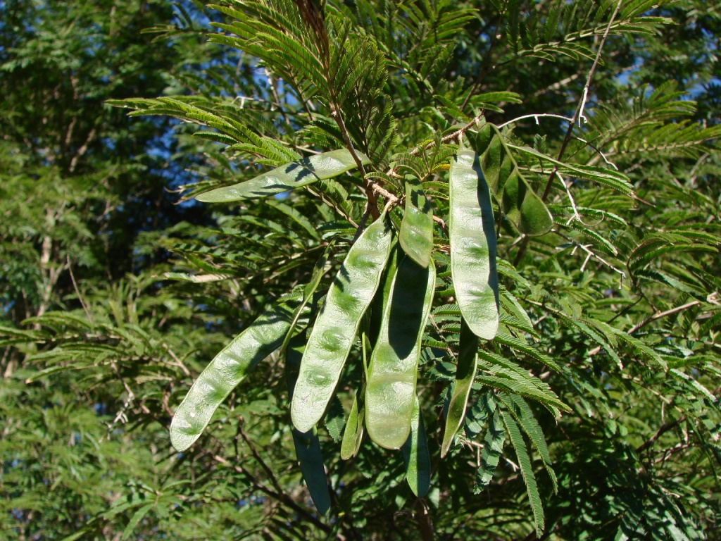 Piptadenia gonoacantha - FABACEAE Parque Olhos D'Água - Brasília - Distrito Federal - Brasil.